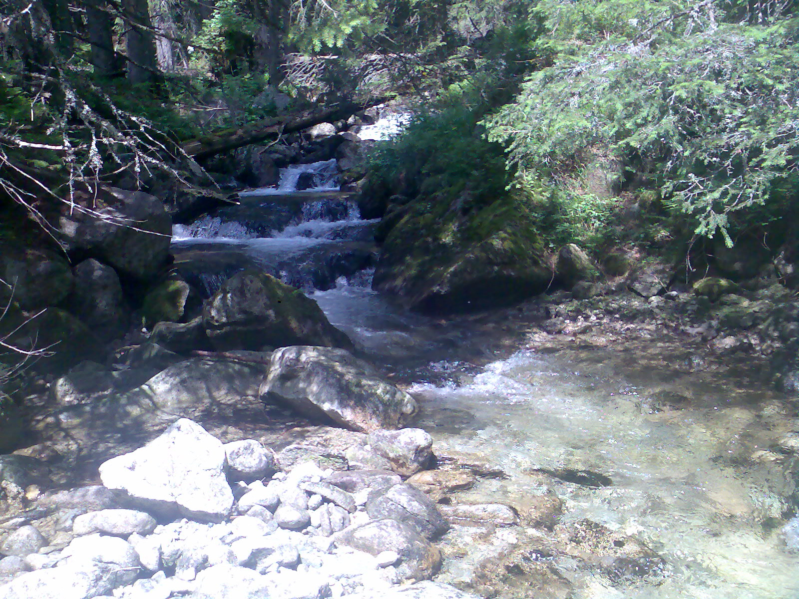 Batizovský potok 4km nad Vyšnými Hágami